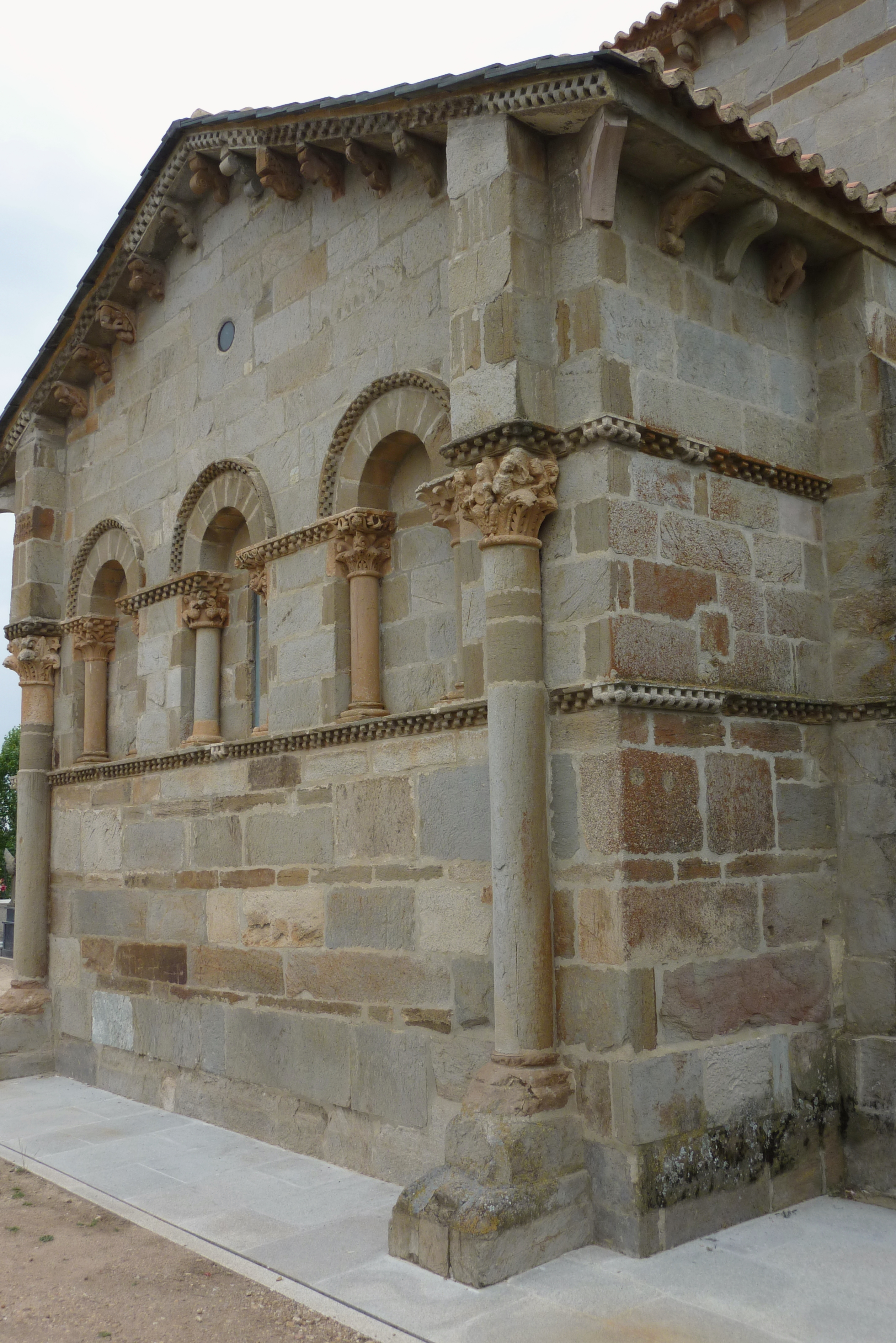 Katholische Pfarrkirche Santa Marta de Tera in Santa Marta de Tera (Camarzana de Tera) in der spanischen Provinz Zamora (Castilla y León)